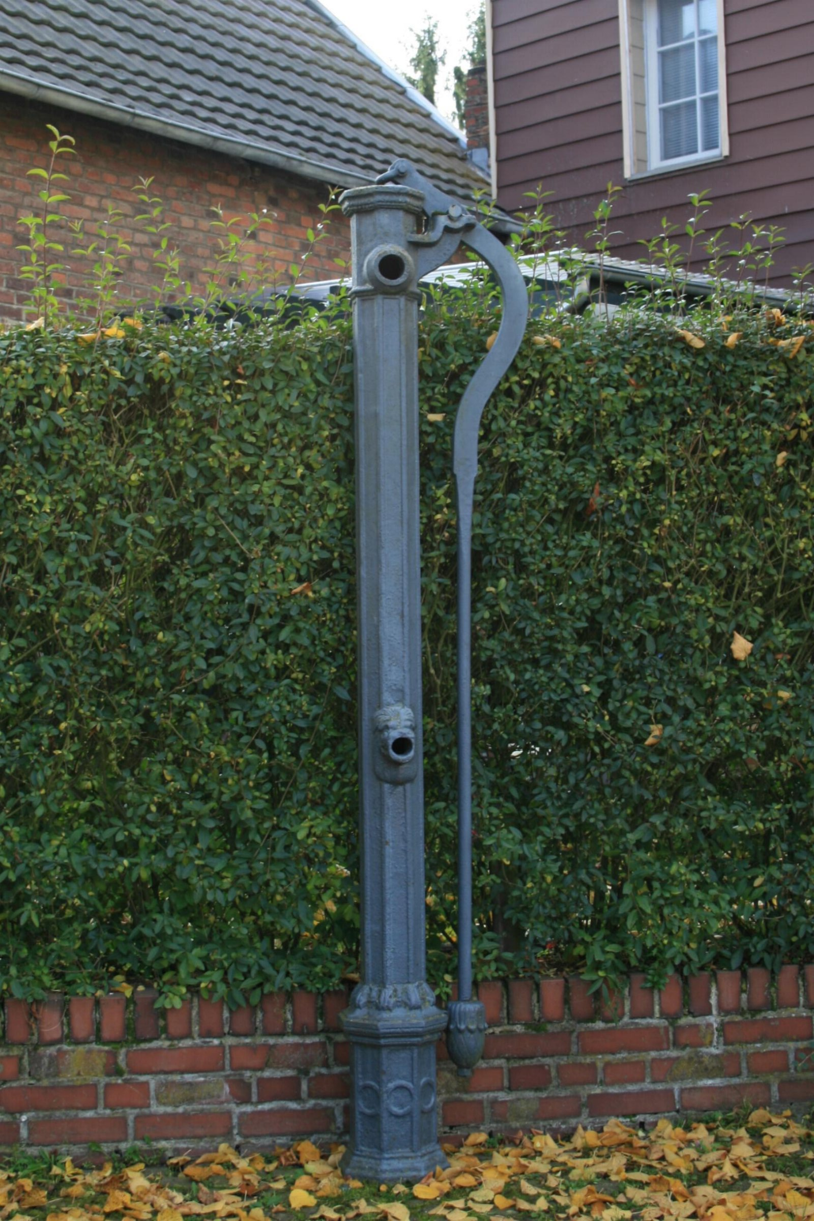 Die ehemalige Dorfwsasserprumpe in Nörvenich-Eggersheim, Weststr.